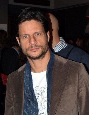 Andrea Sartoretti - Romanzo Criminale 2 - La Serie #5